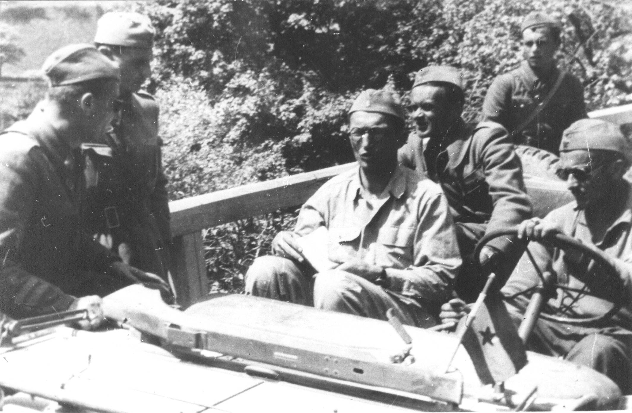 Srpskohrvatski / српскохрватски: Savo Burić - komandant 3. divizije, izdaje zapovest, komandantu 9. crnogorske udarne brigade Dušanu Dragoviću za napad na Celje, Vlaški, maja 1945.